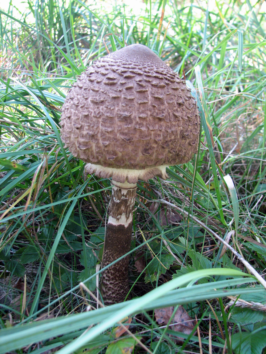 Беларуская (тарашкевіца): Грыб-парасон (мясц. варона, капялюх, парасонiк)